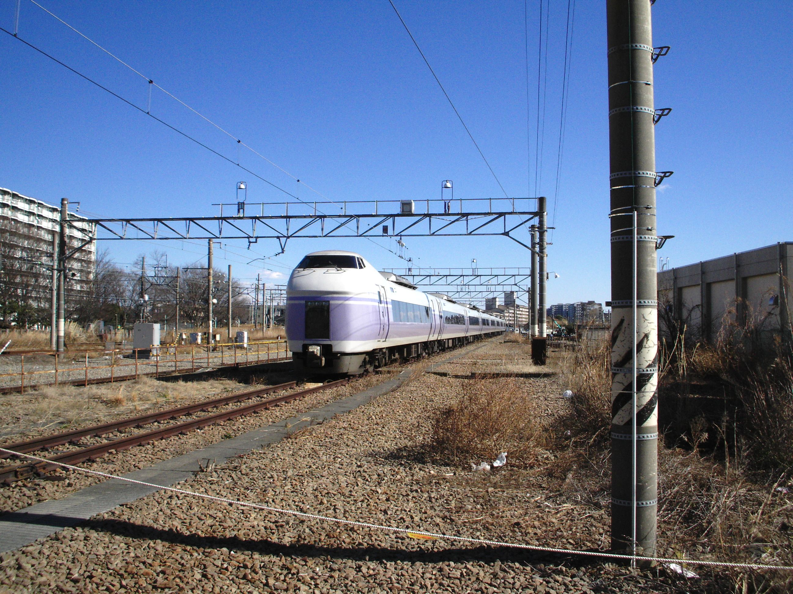 拝島駅、駅東側の留置線で留置されているJR東日本E351系電車